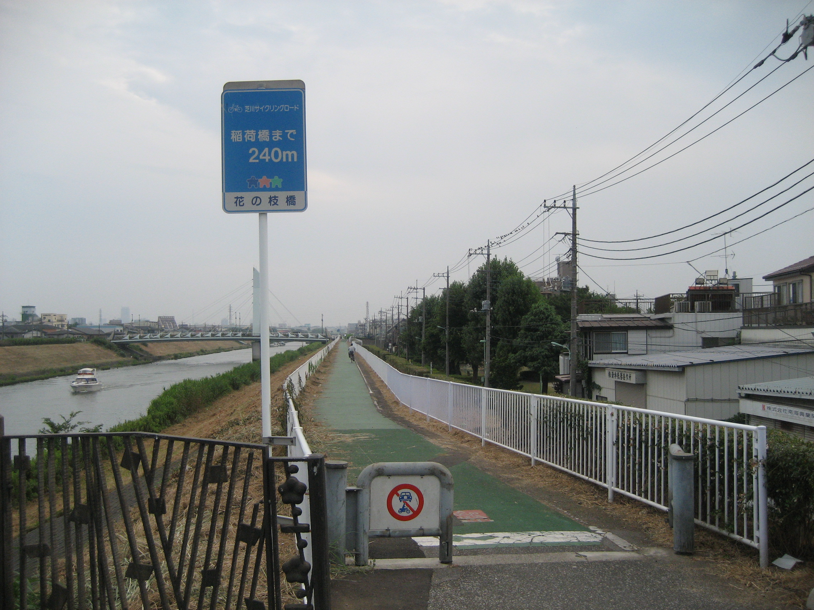 埼玉県道255号線川口市内